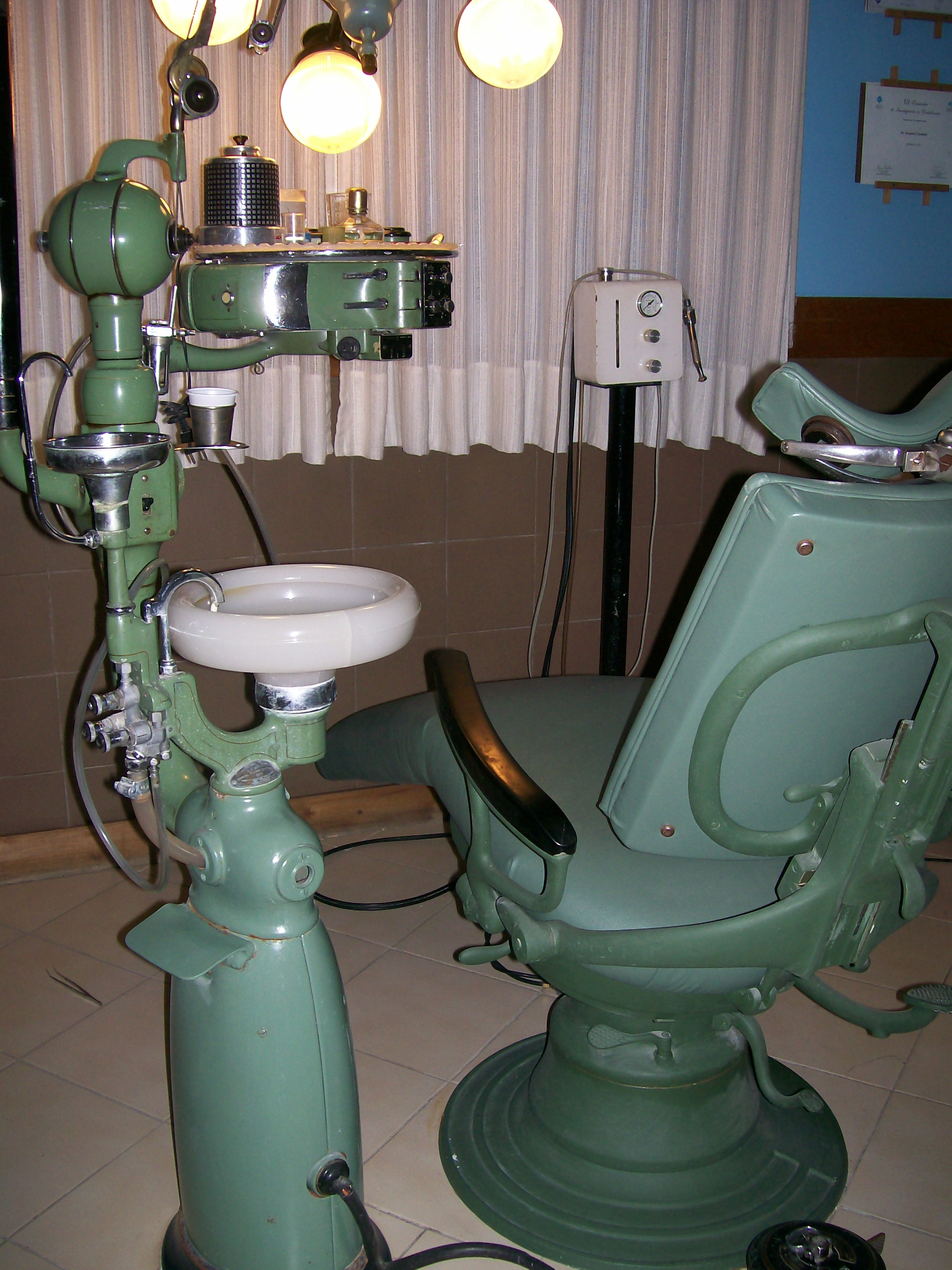 Sillón de dentista de los años '40